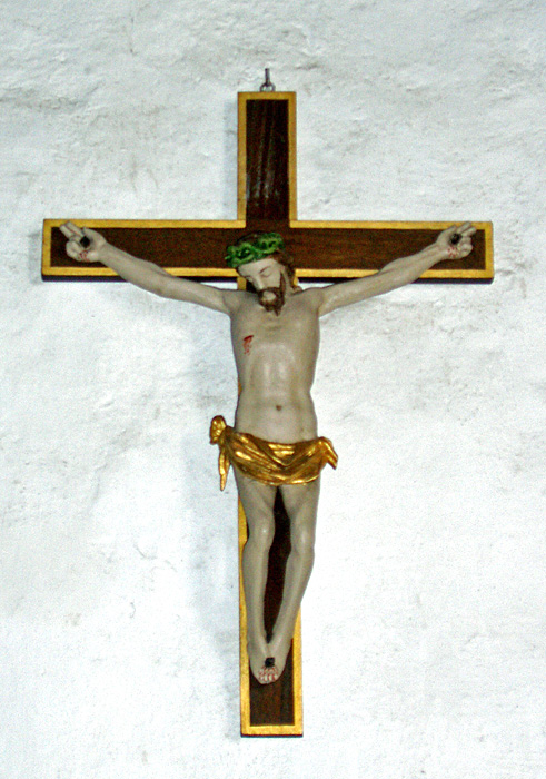 Krucifiks Borum Kirke, Århus Kommune, Denmark